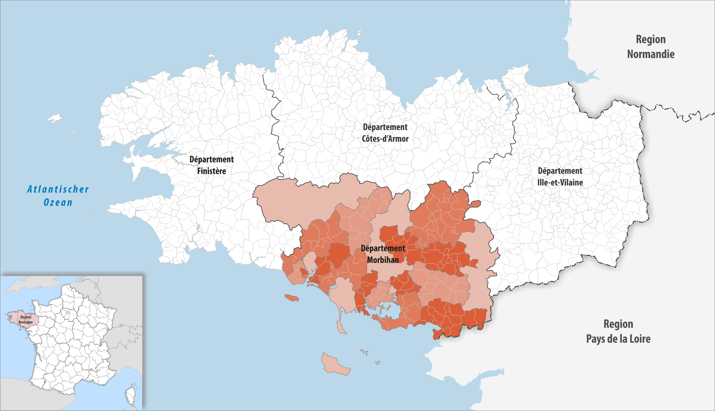 Lage des Departements Morbihan